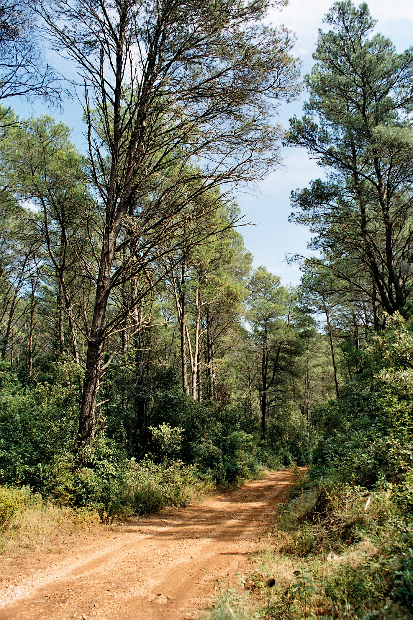 Stoljetne očuvane šume Mljeta.